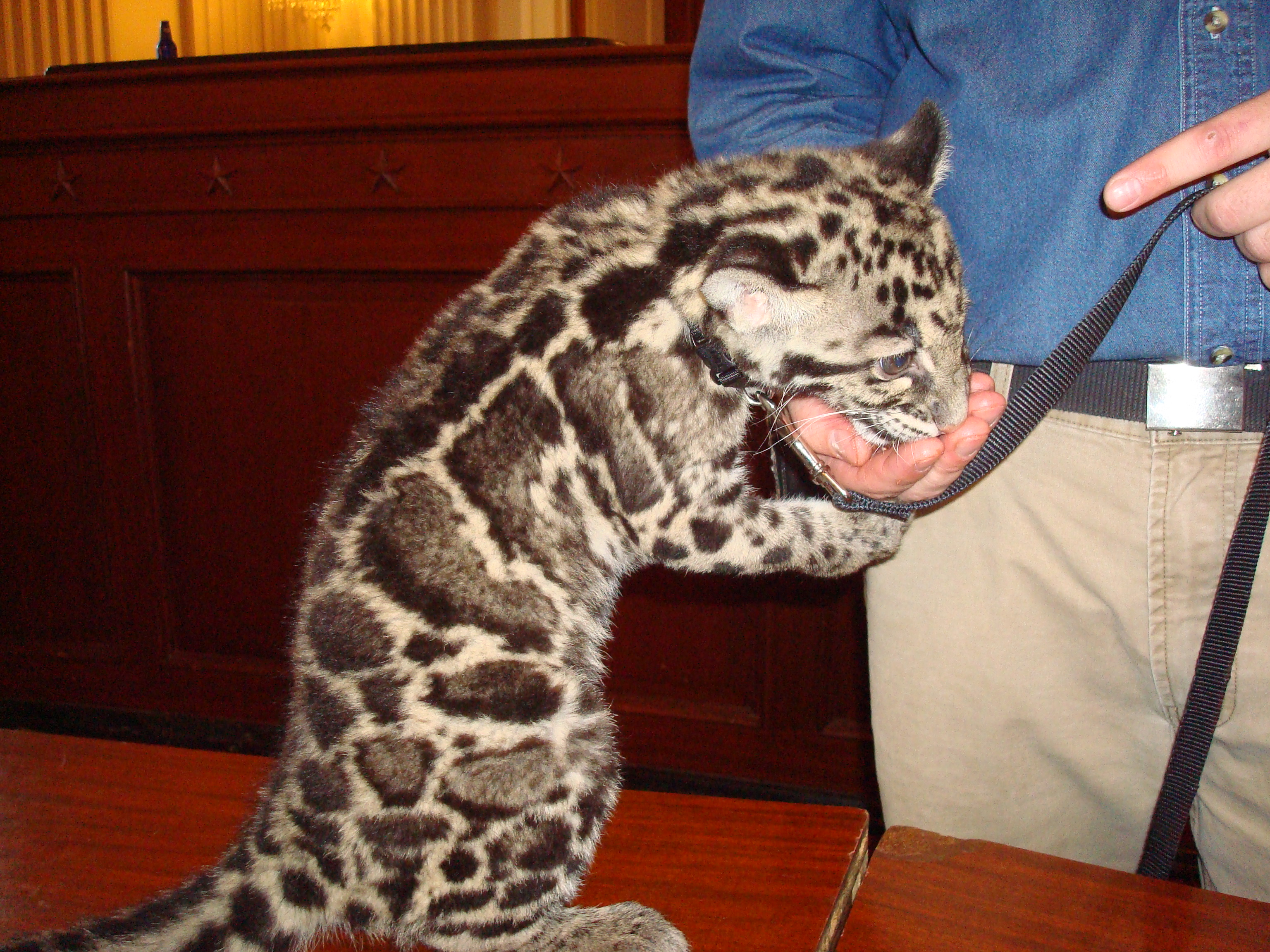 Jeune panthère longibande.